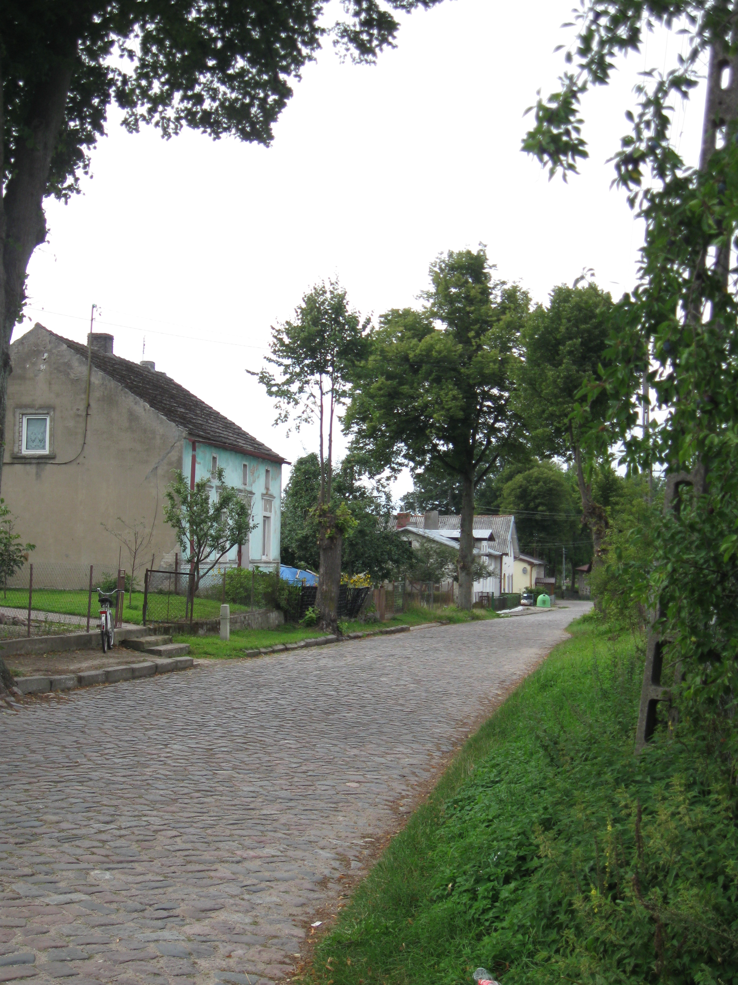 Główna ulica w Świeciu Kołobrzeskim